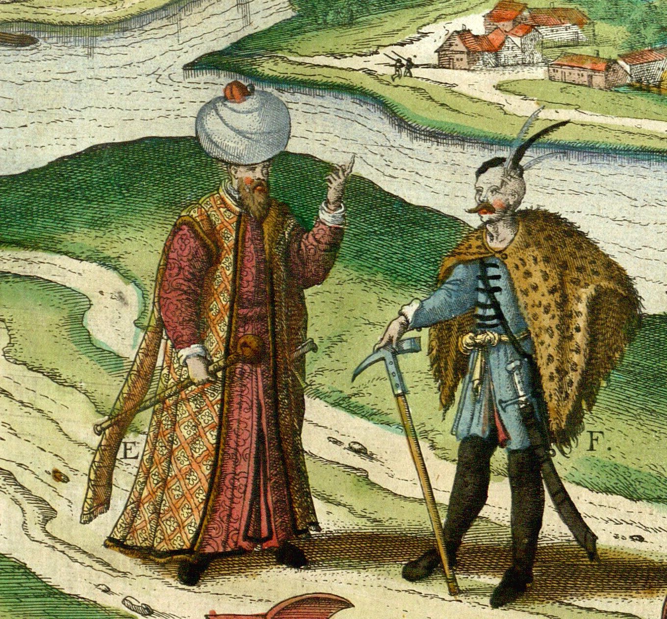 Színezett metszet Braun-Hagenberg: Civitates orbis terranum Buda és Pest látképének részlete